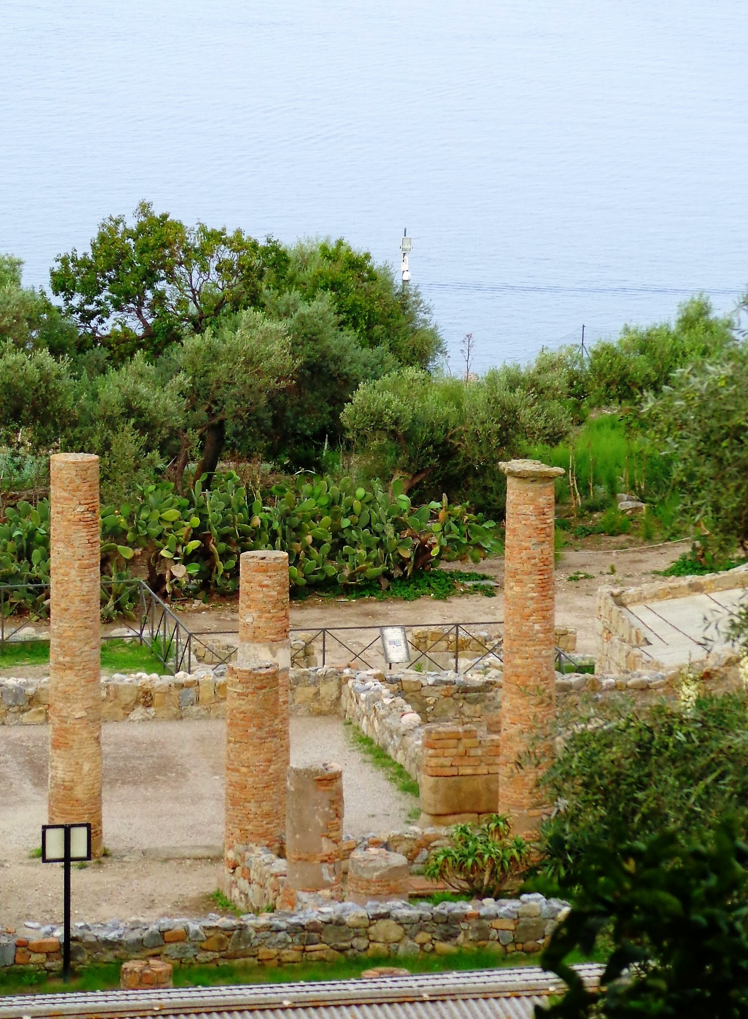 Cortile domus